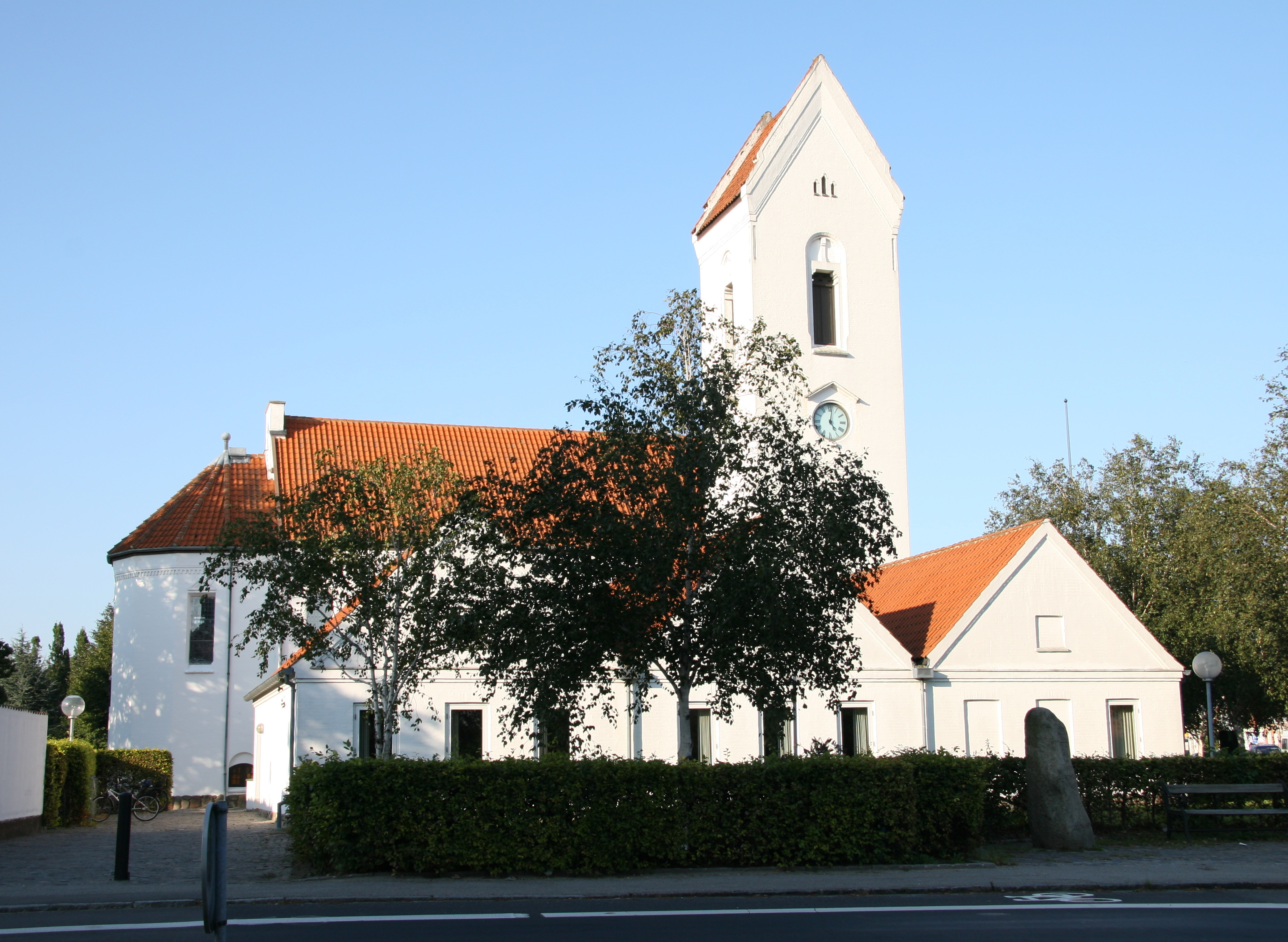 Taastrup Nykirke in Copenhagen County, Denmark Exterior.